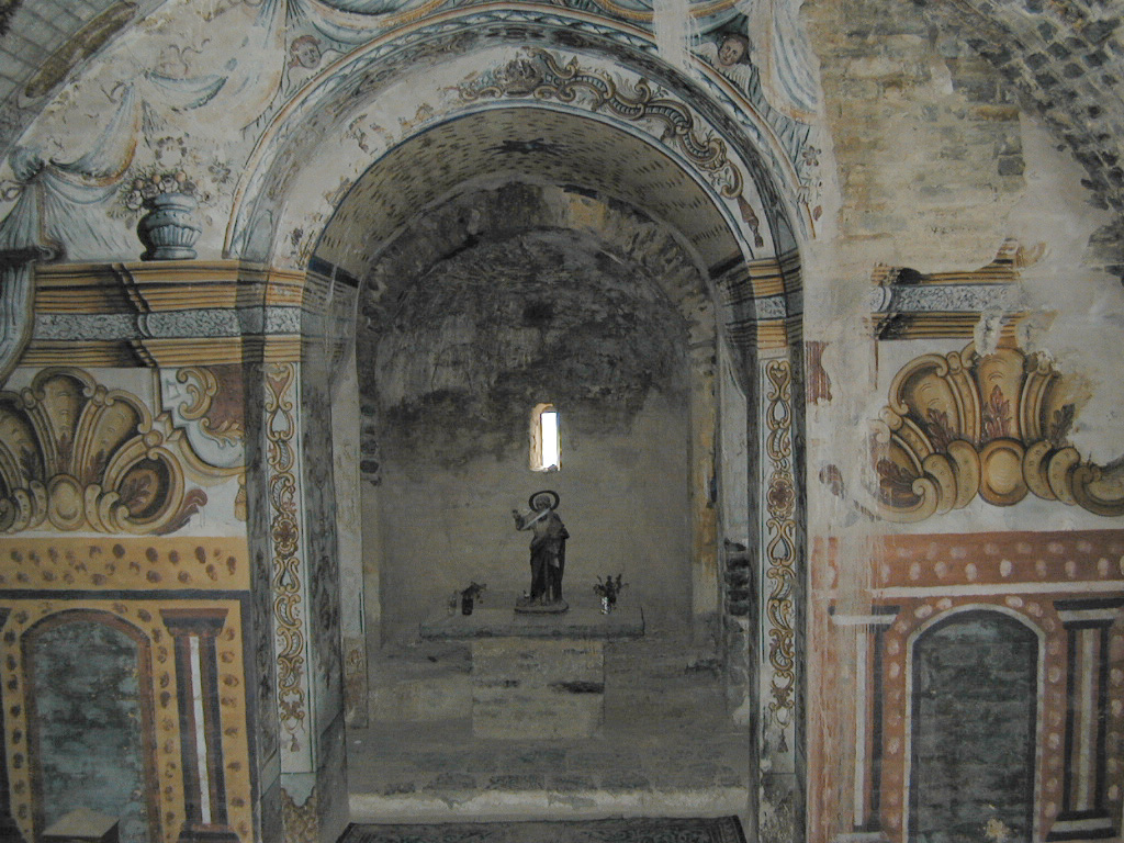 Abside central de la Iglesia de la Asunción de Muro de Roda